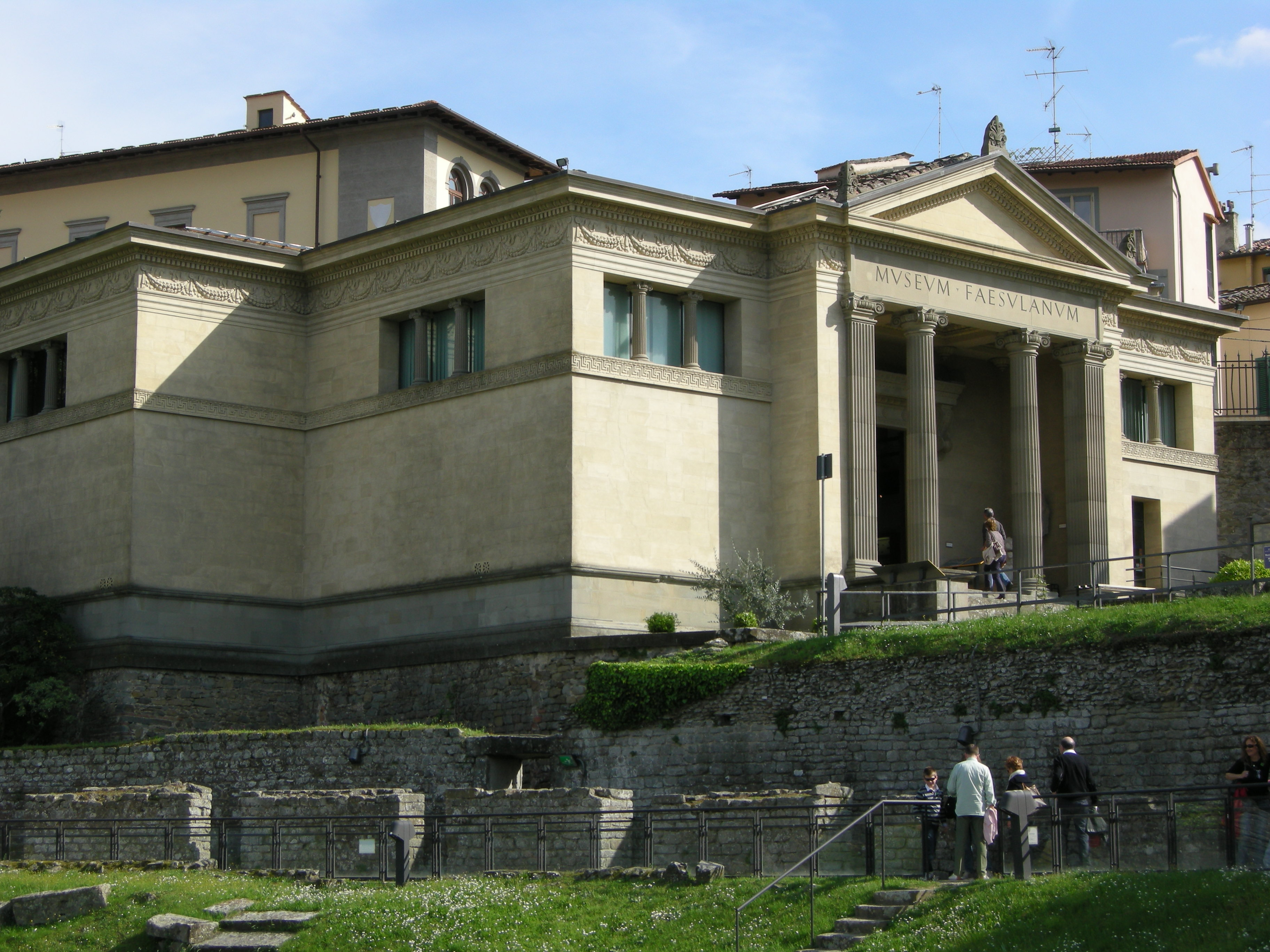 Museo archeologico di feisole, facciata 2